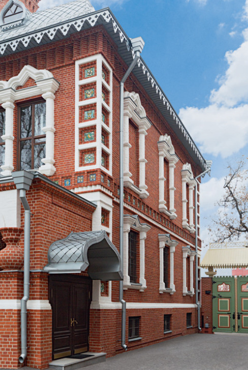 Фрагмент декора особняка Цветкова